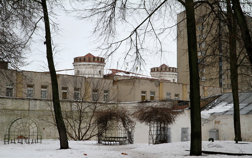 Мінск. Пішчалаўскі замак